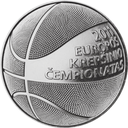 1 litas coin